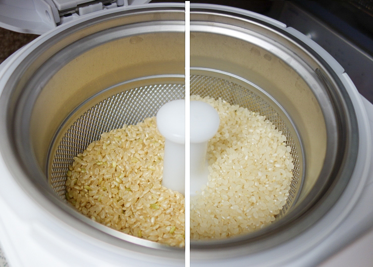 左）精米前の玄米 右）精米後（胚芽米） （山本電機 YE-RC41 「胚芽白米仕立て」モード、玄米は「ゆめぴりか」）